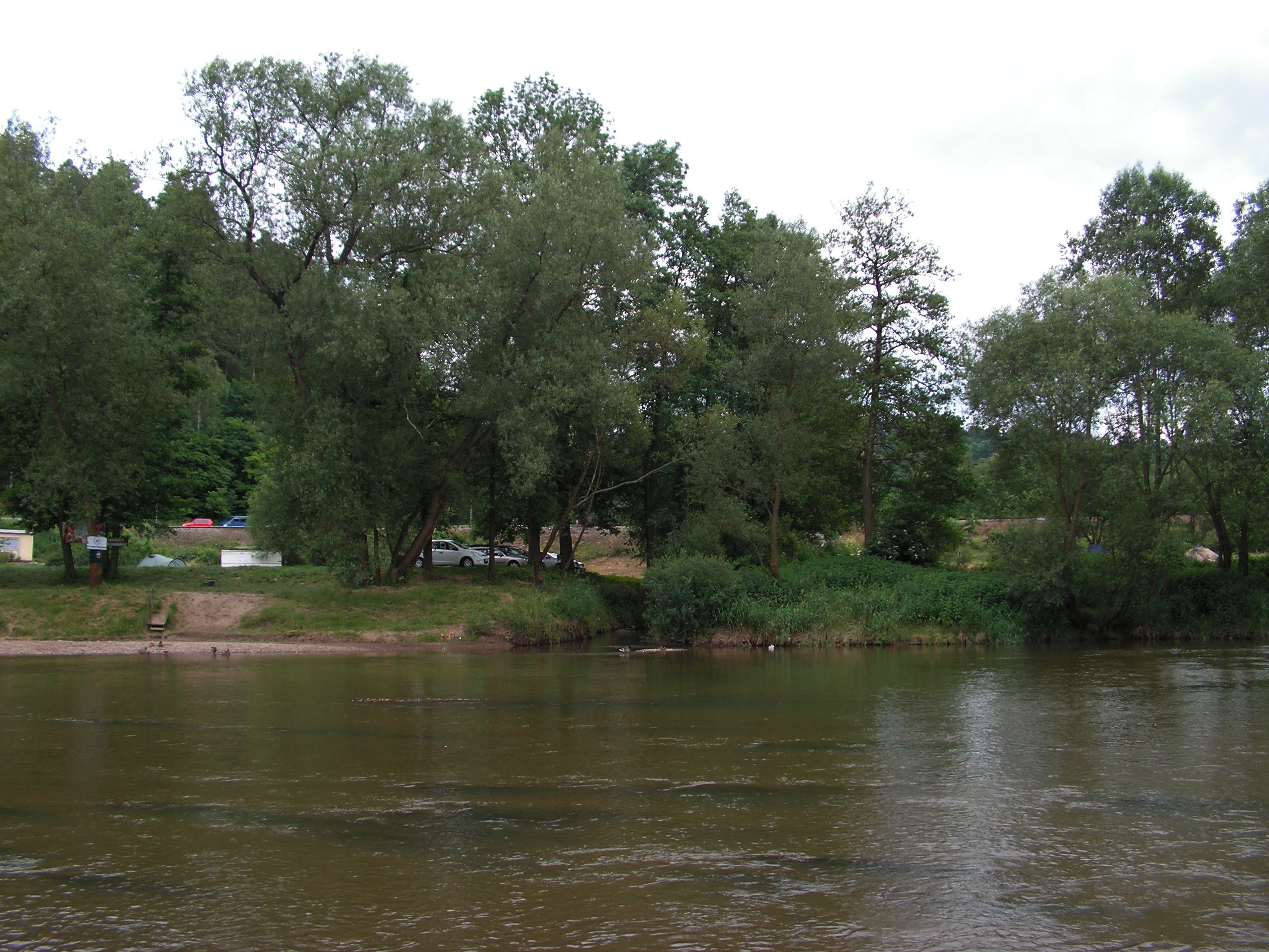 Ústí Čestínského potoka do Sázavy v Kácově